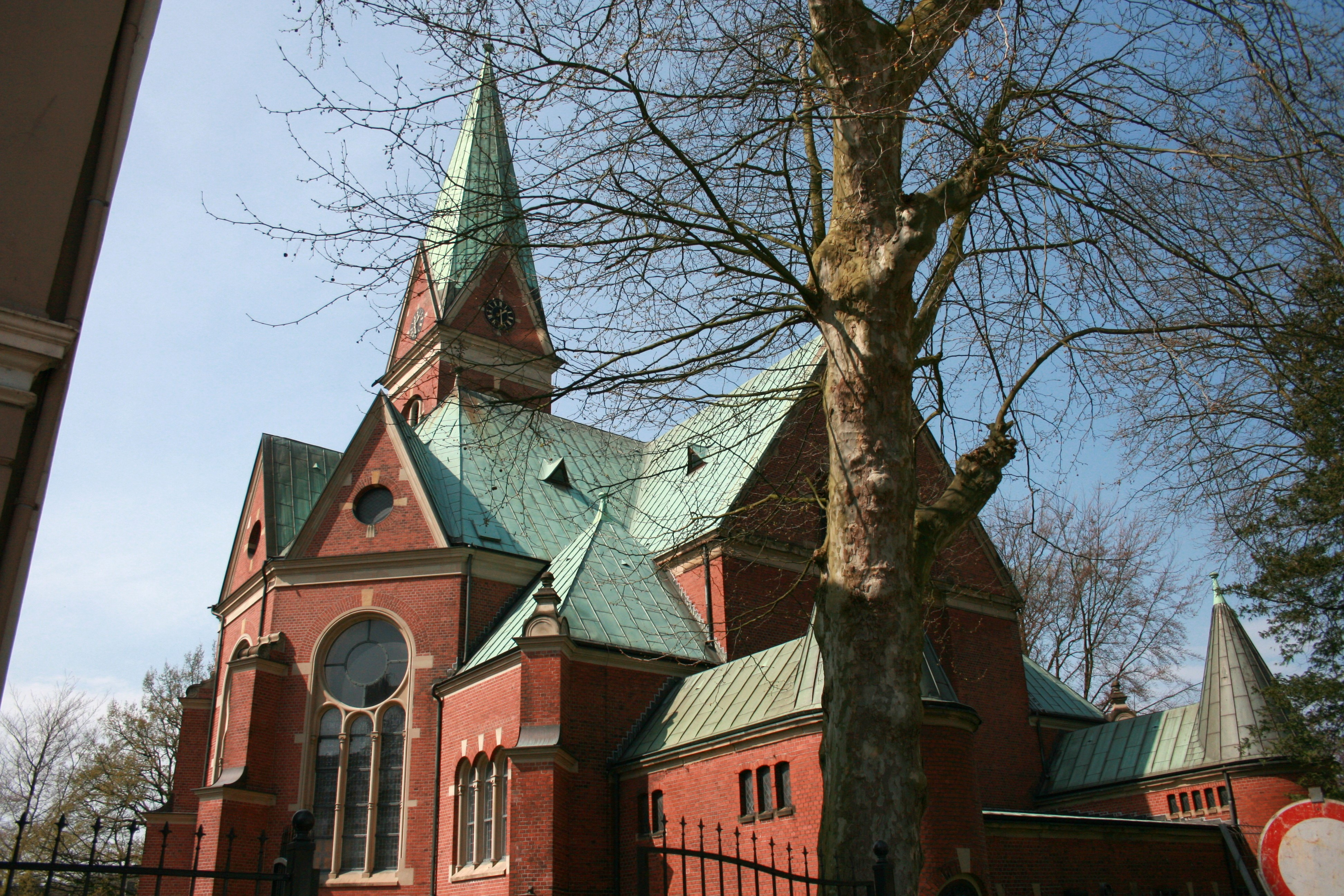 Evangelische Kirche Werden an der Heckstraße in Essen-Werden